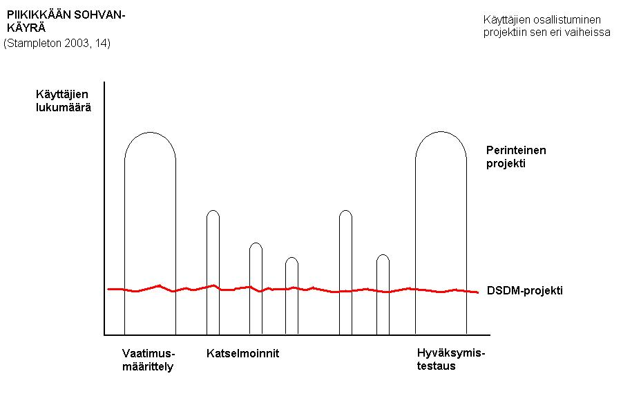 DSDM-projektin asiakasosallisuus